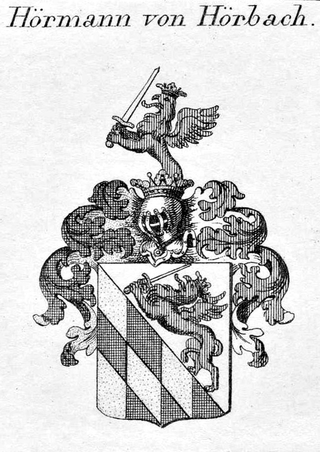 Wappen der bayerisch-österreichichen Adelsfamilie Hörmann von Hörbach